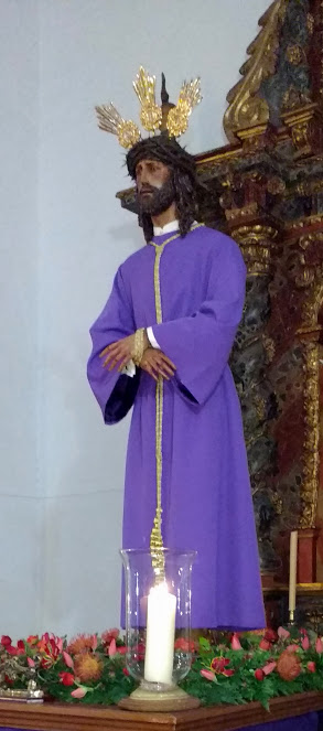 Nuestro Padre Jesús de la Salud en su paso de víacrucis